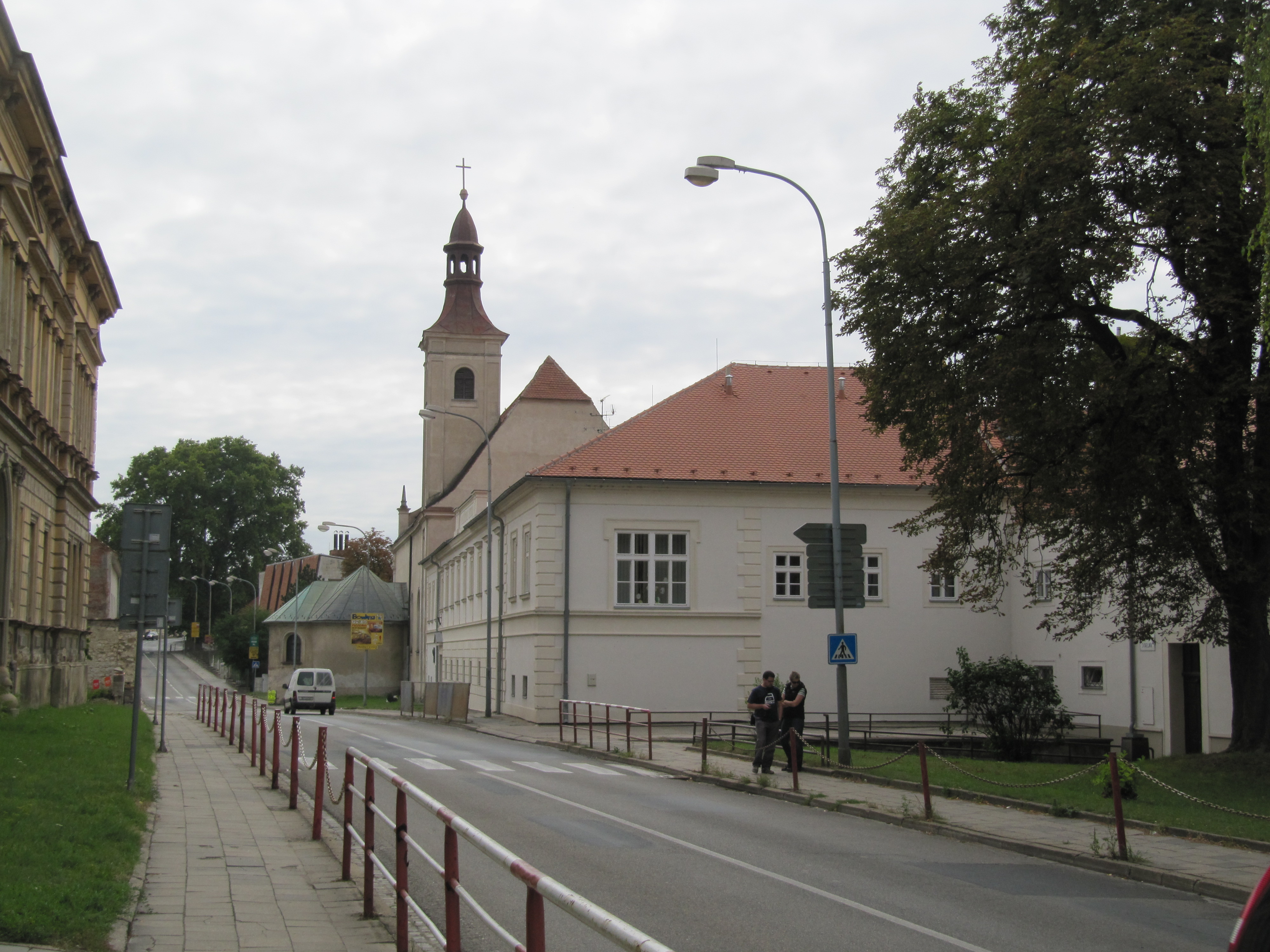 Klášter piaristický s gymnáziem (Mikulov), Purkyňova, Komenského 271/6, Mikulov